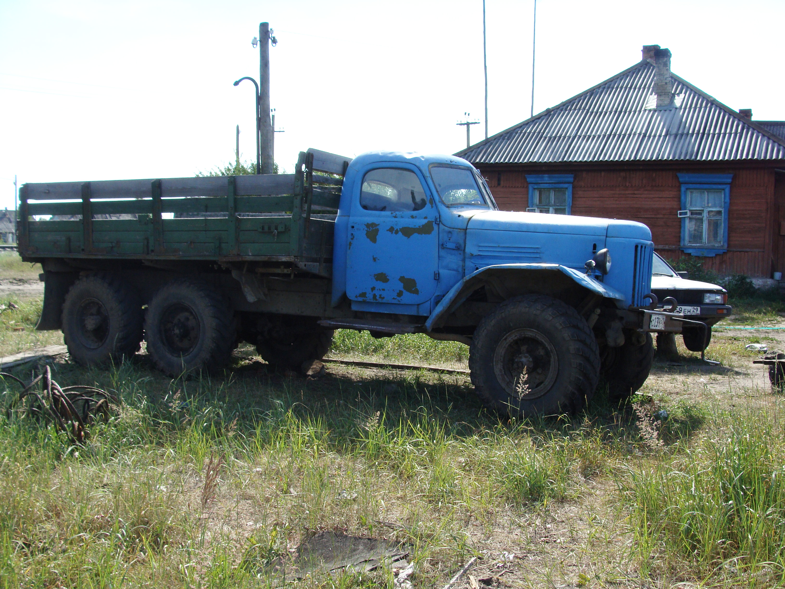 п. Черемушский Котласского района Архангельской области.